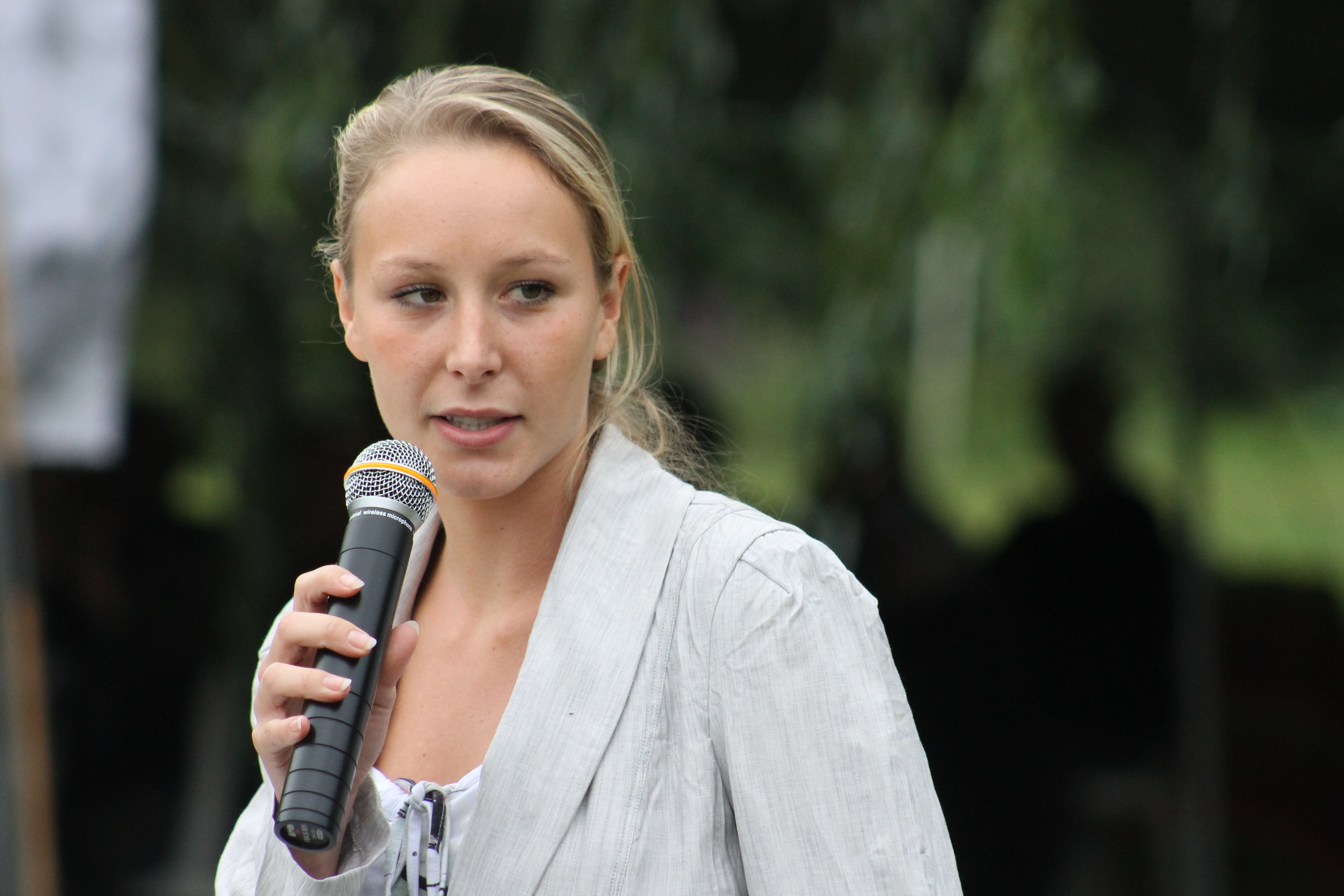 Marion Maréchal-Le Pen à un dîner-débat organisé le 1er septembre 2012 à Livré-La-Touche, en Mayenne. Photo © 2012 G. Bouchet/Front national